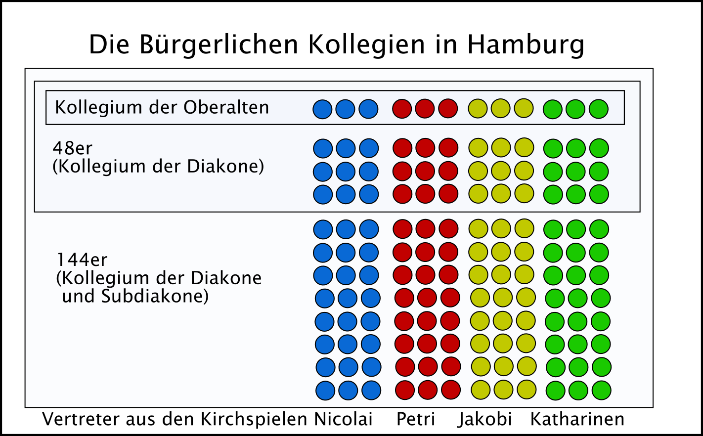 Darstellung der bürgerlichen Kollegien Hamburg um 1530 Sonstiges: erstellt mit inkscape als svg dann als PNg abgespeichert wegen der Darstellungsproblematik.